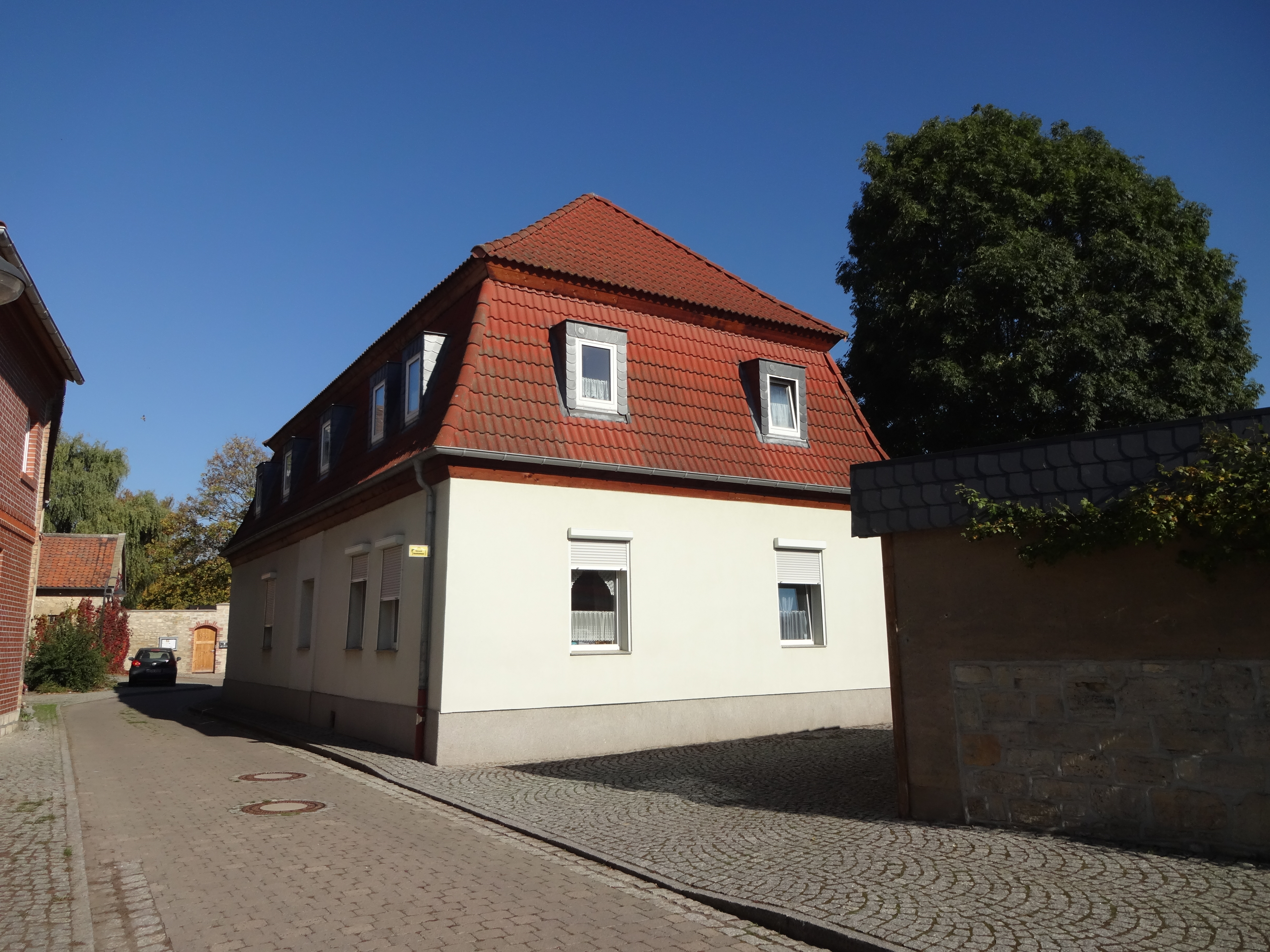 denkmalgeschütztes ehemaliges Lehrerhaus in der Kirchstraße 28 in Zilly